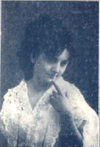 Eibenschütz Mari, Ditrói Mór felesége, magyar színésznő